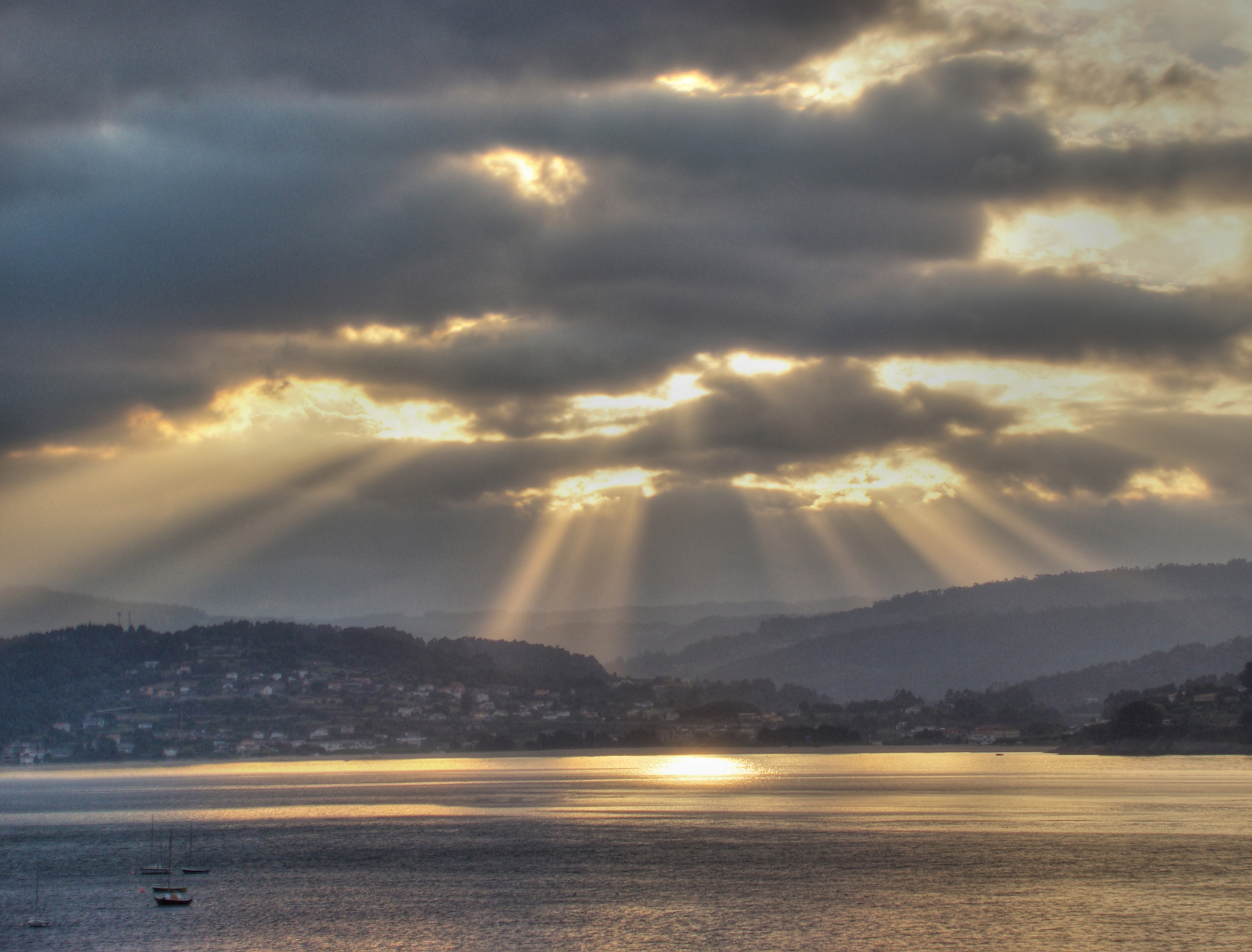 Amanece en Sada - A Coruña